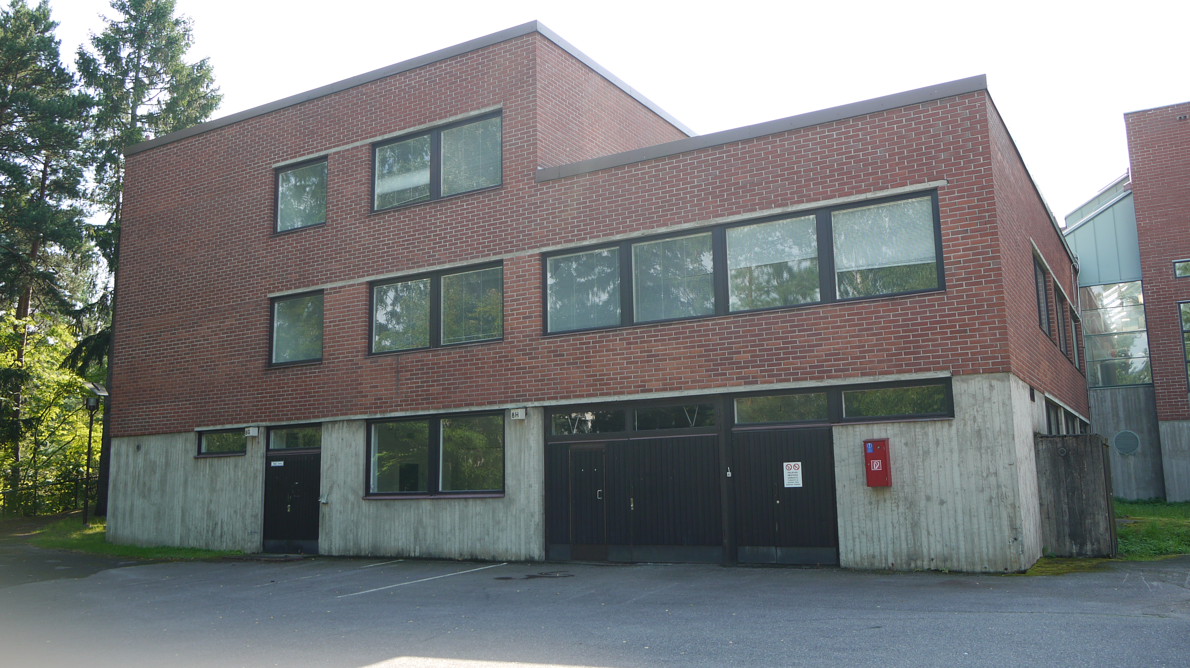 Protoshopin materiaalimyymälä Espoon Otaniemessä